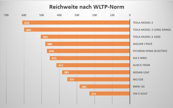 Nur reine E-Autos, keine HybridmodelleStand, 06/2019